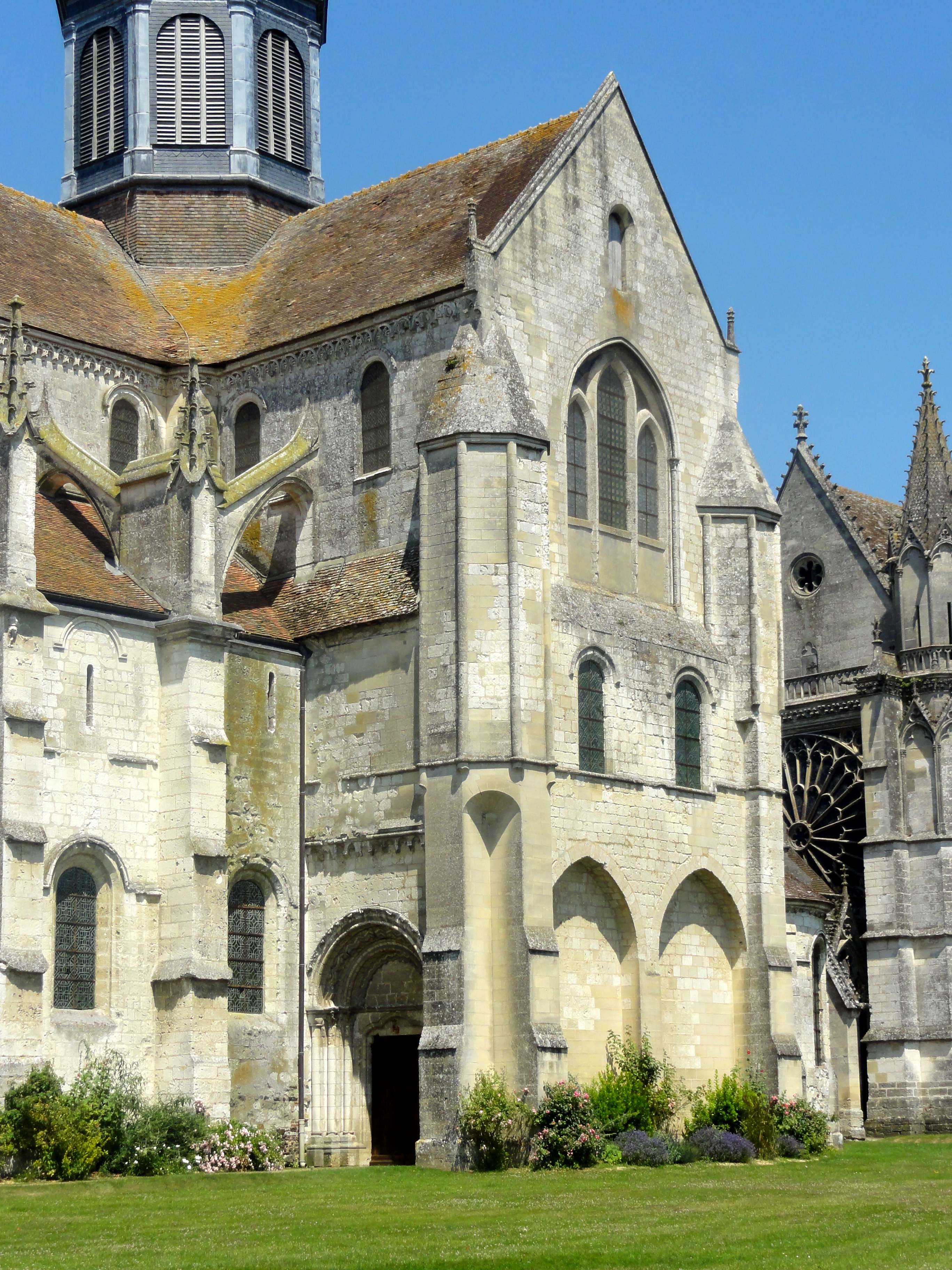 Église abbatiale Saint-Germer de l'ancienne abbaye Saint-Germer-de-Fly - voir le titre du fichier.